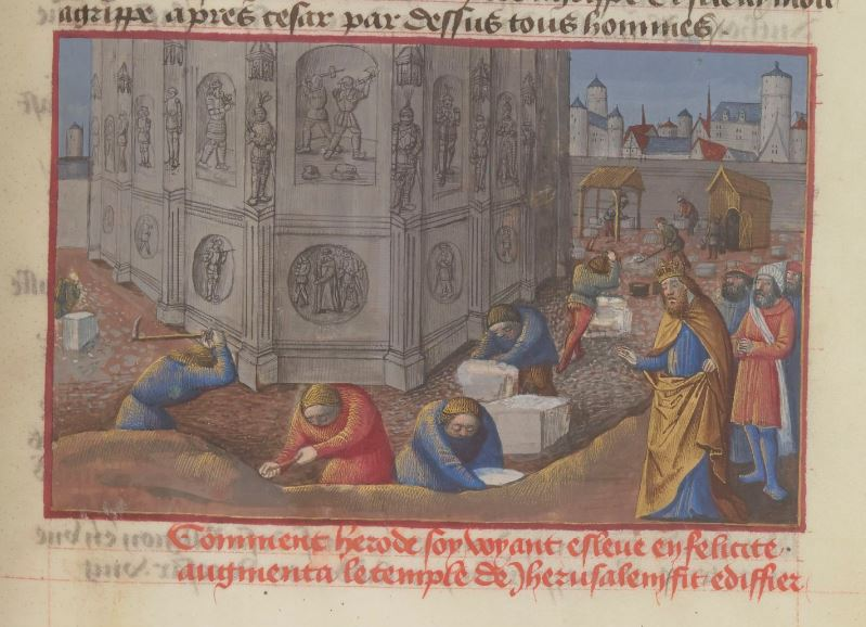 Français 405, fol. 113, Reconstruction du Temple de Jérusalem (vers -20)